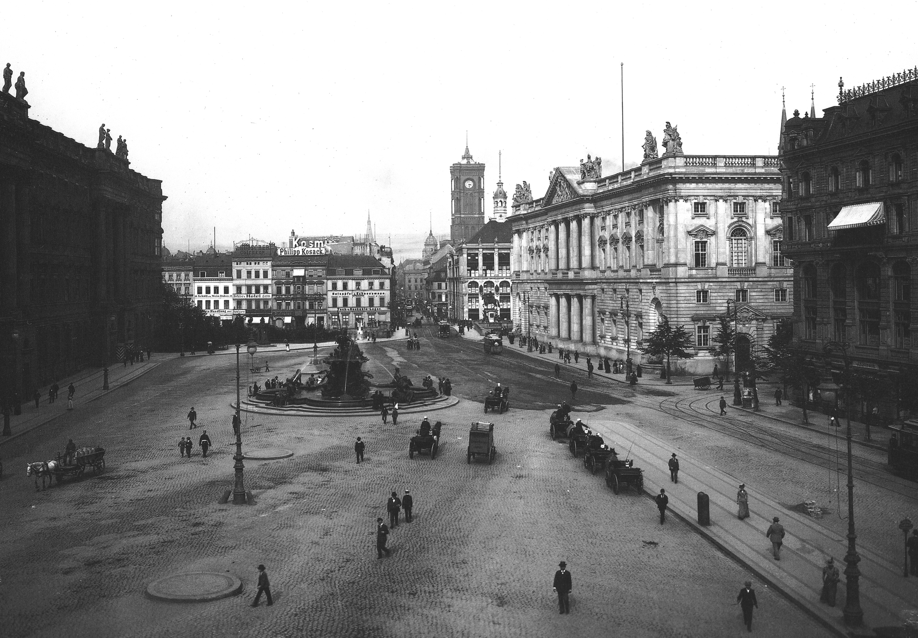 Schlossplatz mit Blick in die Königstraße (heutige Rathausstraße); links das Stadtschloss Berlin mit dem Neptunbrunnen davor; rechts im Bild, gegenüber dem Schloss, dominiert der Neue Marstall das Stadtbild.